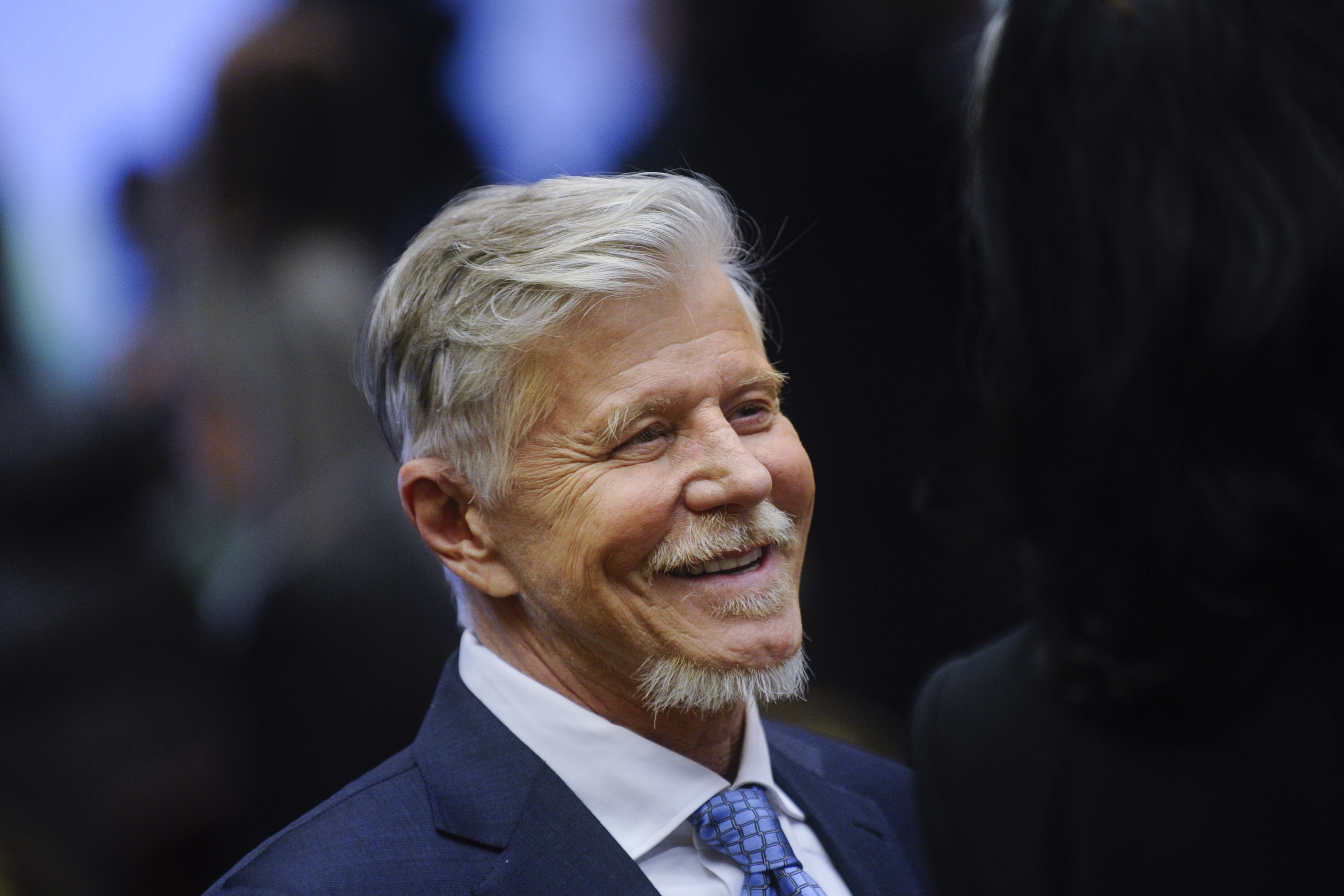 Sessão solene de posse da ministra Cármen Lúcia na presidência e do ministro Dias Toffoli na vice-Presidência do Supremo Tribunal Federal (STF). Em destaque, ator Miguel Falabella. Foto: Marcos Oliveira/Agência Senado